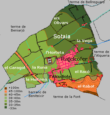 terme municipal de Rafelcofer